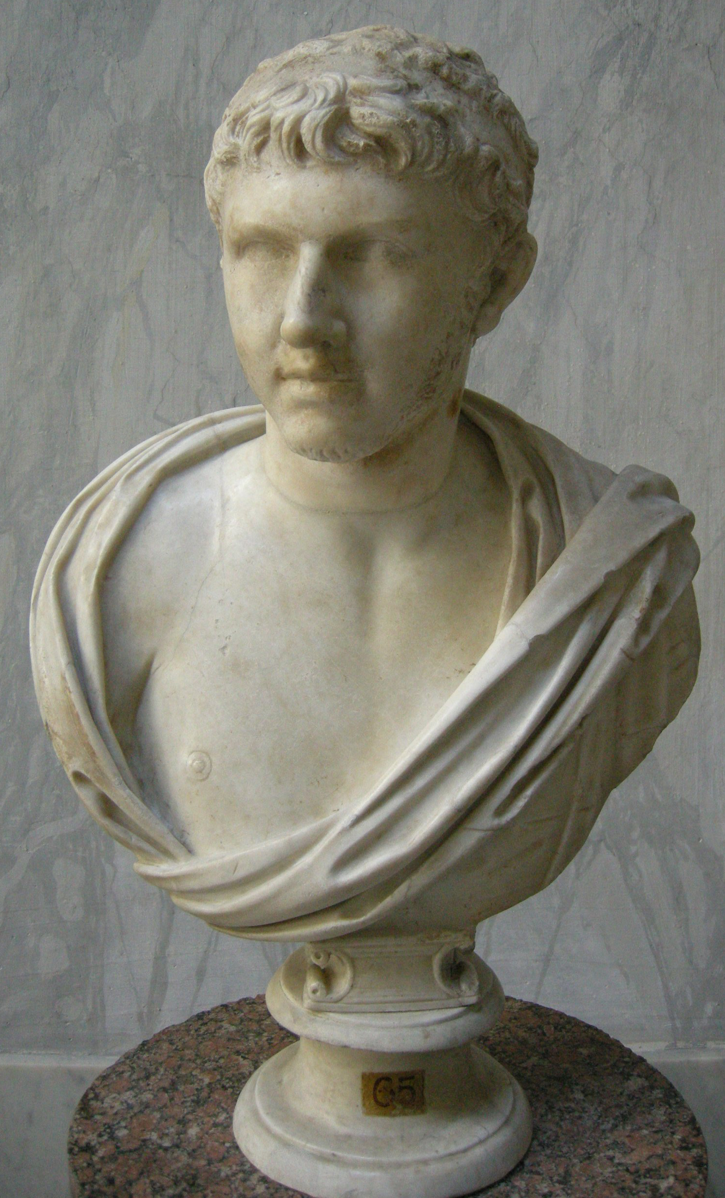 Busto, di restauro moderno, di Tolomeo re di Numidia e Mauretania. Musei Vaticani, Museo Chiaramonti - Braccio Nuovo; inv. 2253.